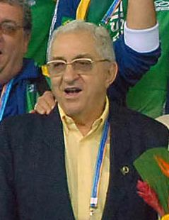 Presidente da Confederação Brasileira de Futebol de Salão